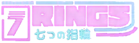 Logo del video musical del sencillo 7 Rings por Ariana Grande